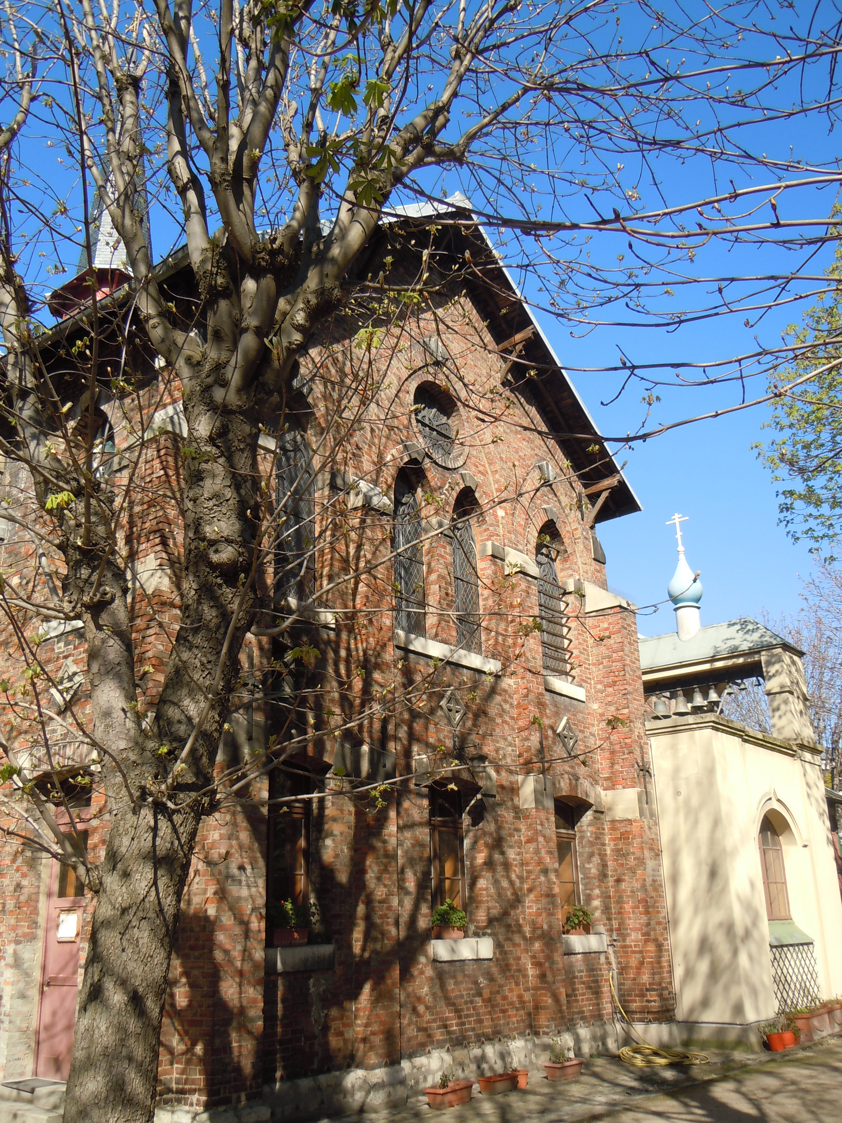 Église orthodoxe Saint-Serge - église coté sud